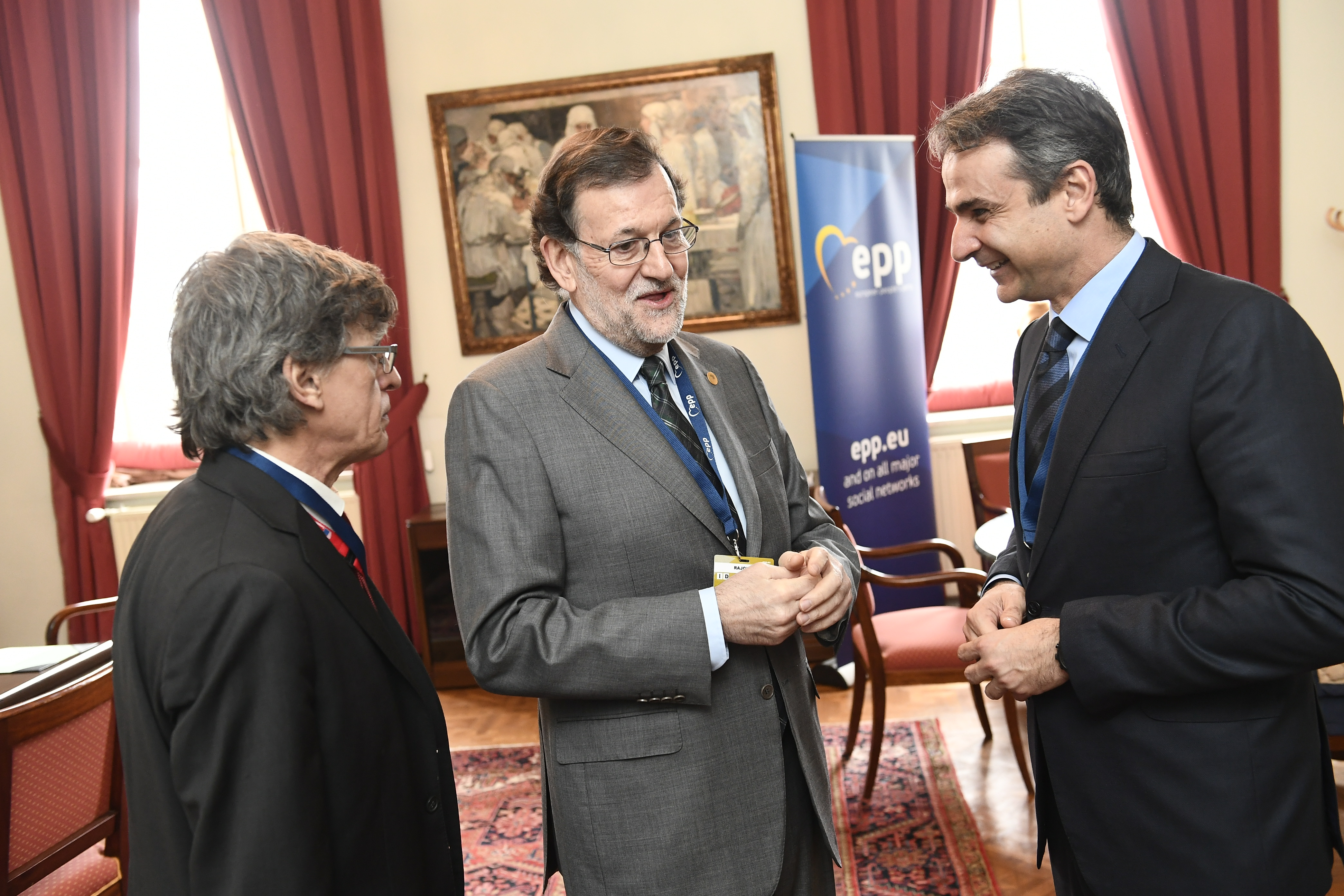 EPP Summit, Brussels, March 2017